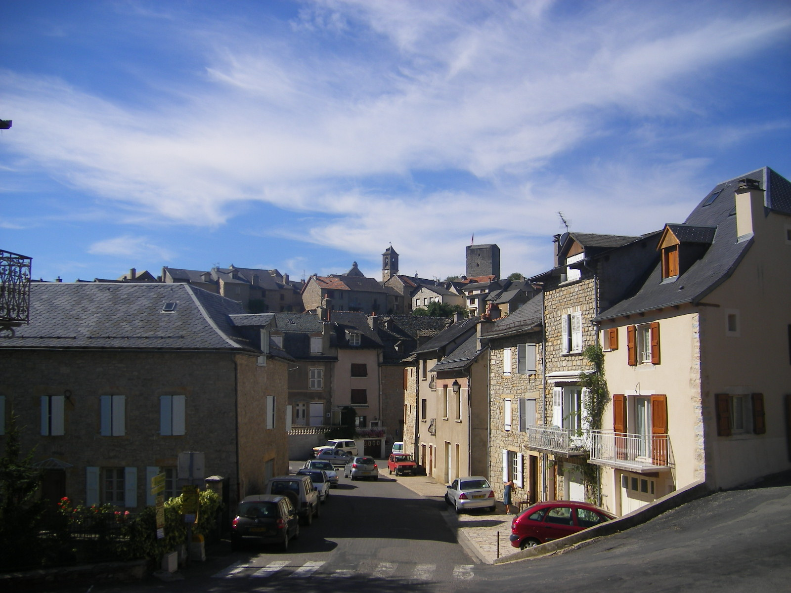 Chanac